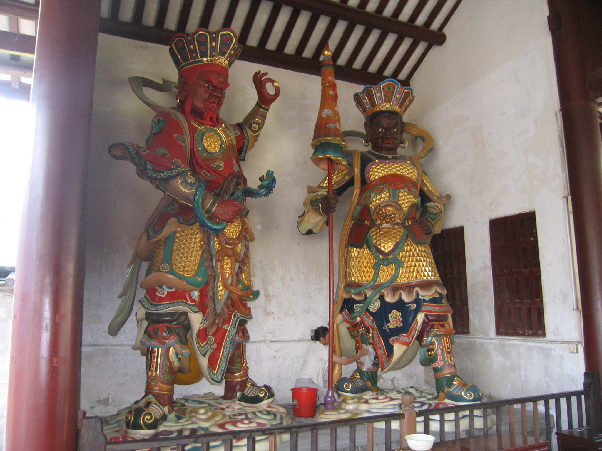 Statues in Guangxiao Temple, Guangzhou.